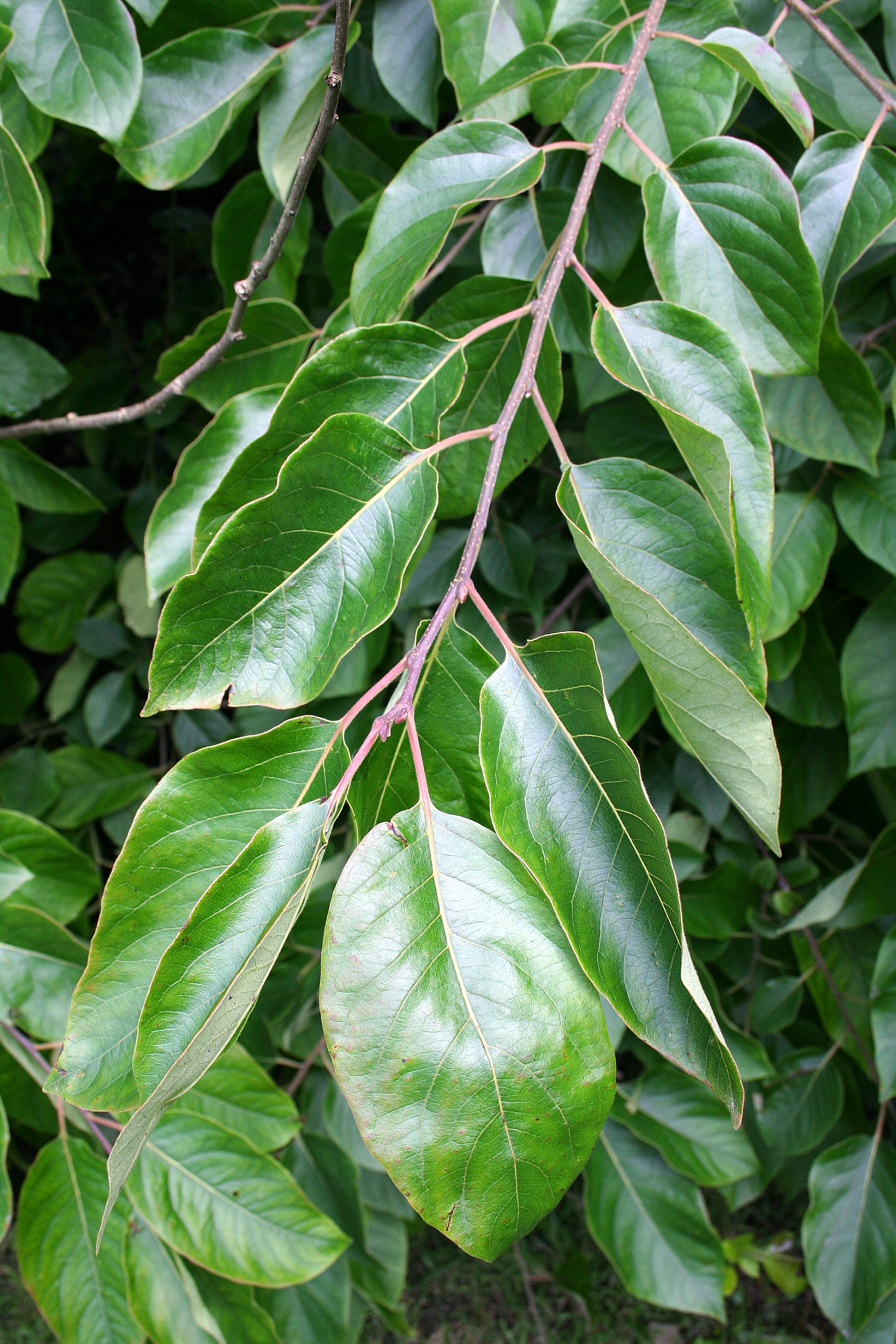 Feuilles du plaqueminier de Virginie (Diospyros virginiana)